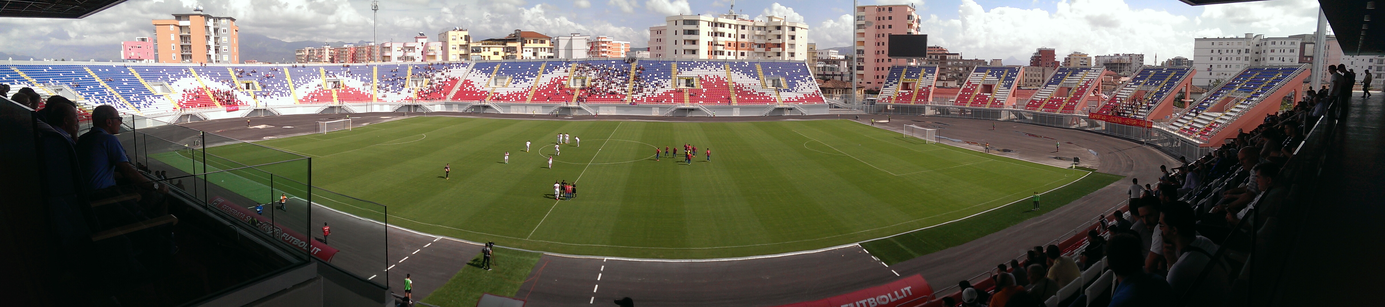 Liga Spiel zwischen Vllaznia Shkoder und Flamurtari Vlore